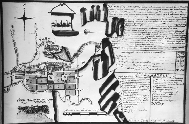 Стерлитамак. Экспликация 1794г. Составлена землемером Тимофеем Афанасьевым